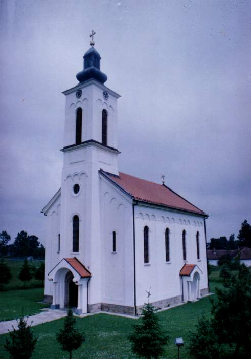 Храм Светог Николе у Милошевцу (општина Модрича), подигнут 1906. године.